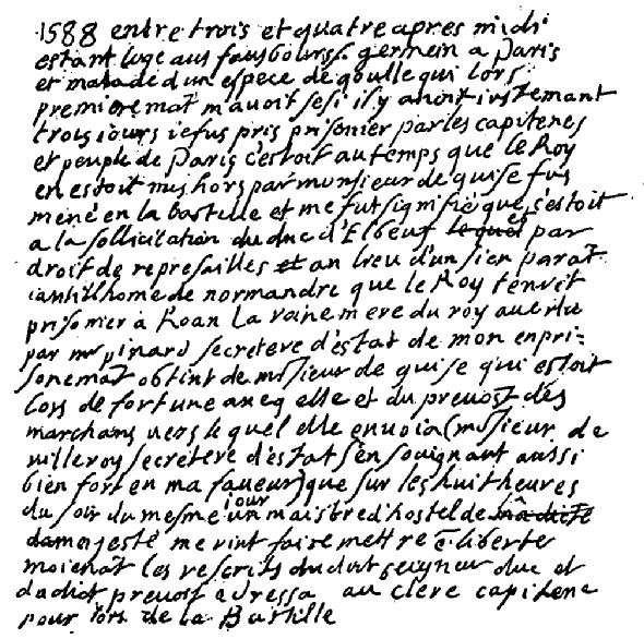 Note de Montaigne sur sa mise au cachot à la Bastille (10 juillet 1588).